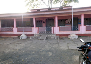 बंडोल